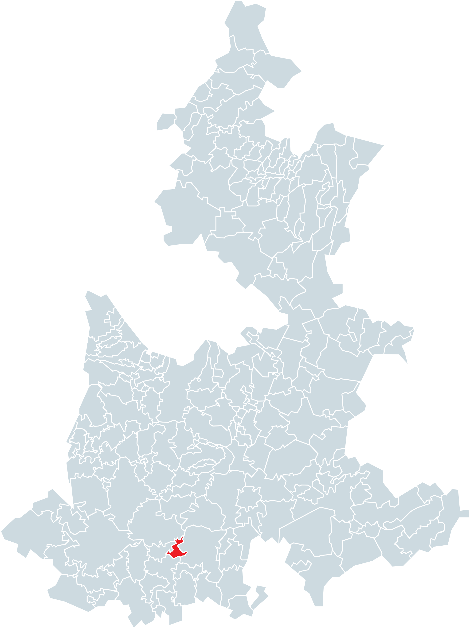 Municipio de Ahuehuetitla